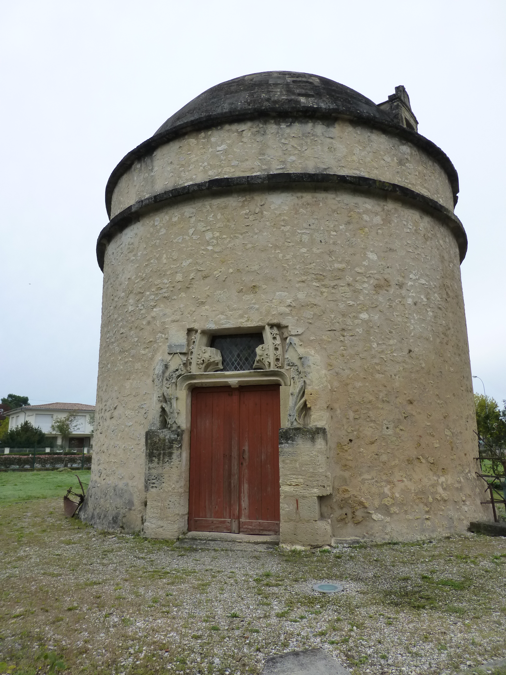 Eysines, Pigeonnier de Lescombes du XVIe siècle bâti au-dessus du puits du château, et reconverti en château d’eau à la fin du XIXe siècle.